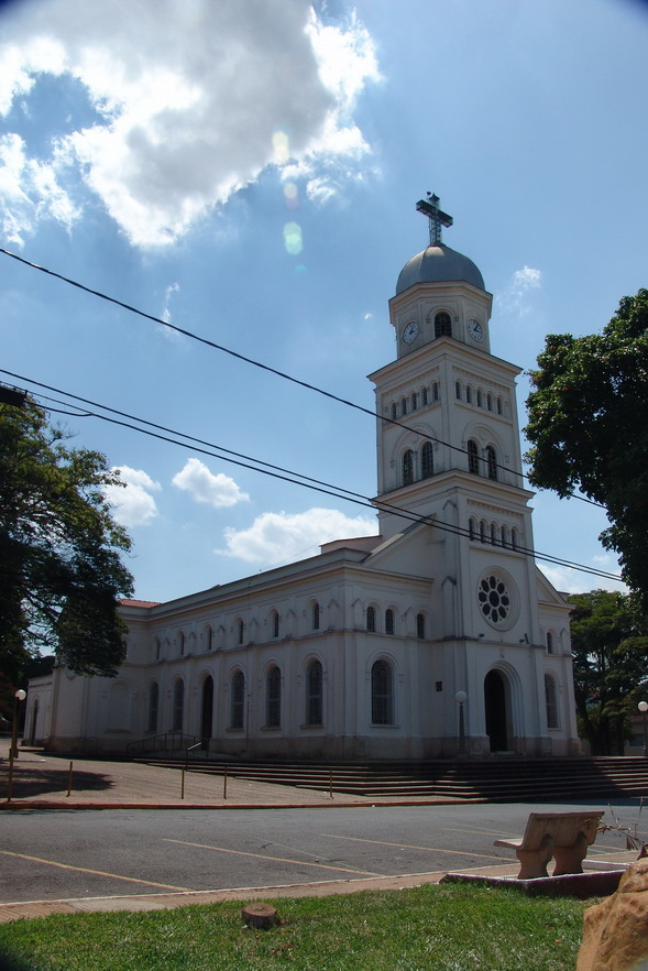 Imagem do município de Dois Córregos, estado de São Paulo, Brasil.